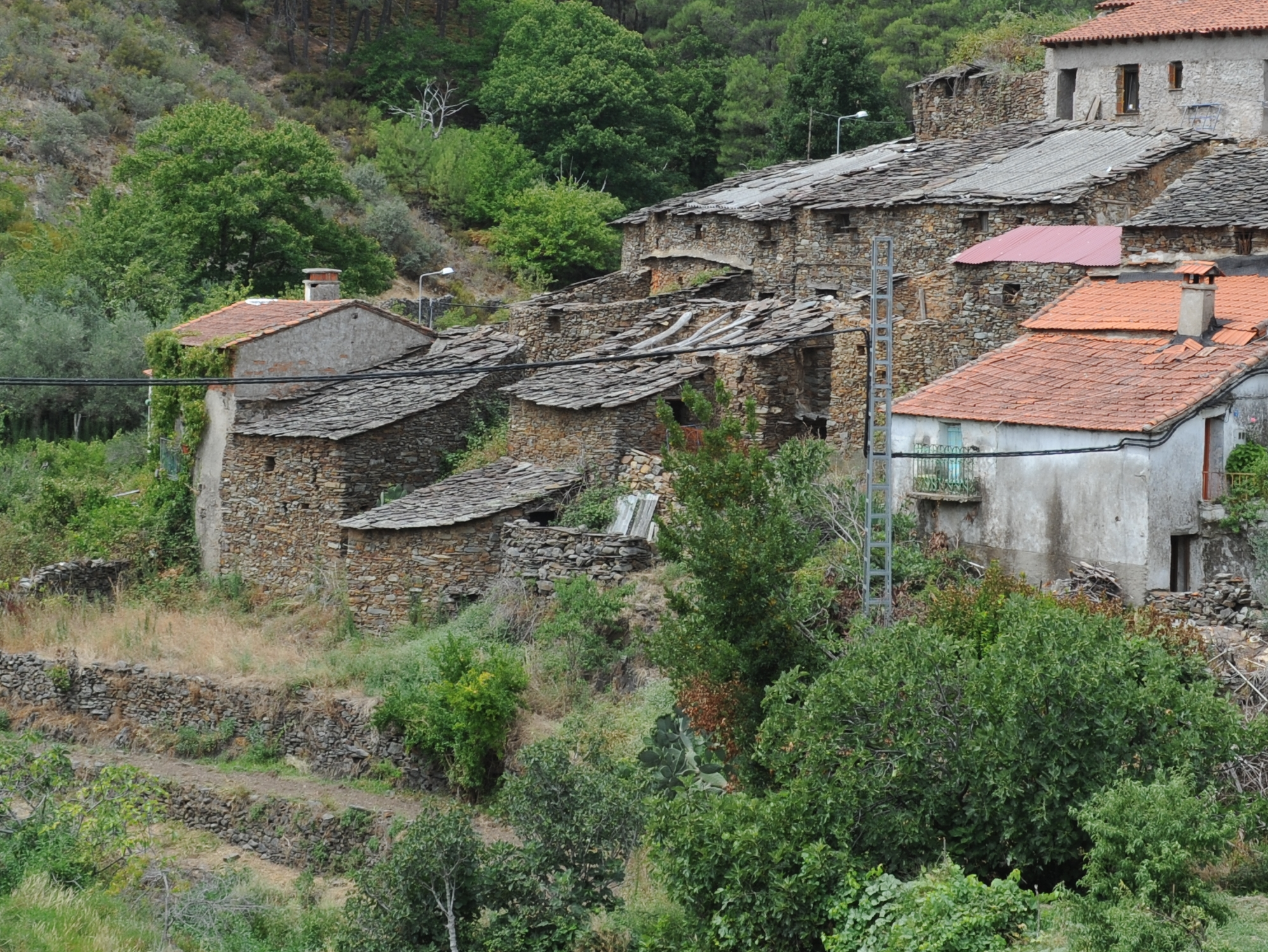 Vista del barrio histórico de Aceitunilla, Las Hurdes (Cáceres)